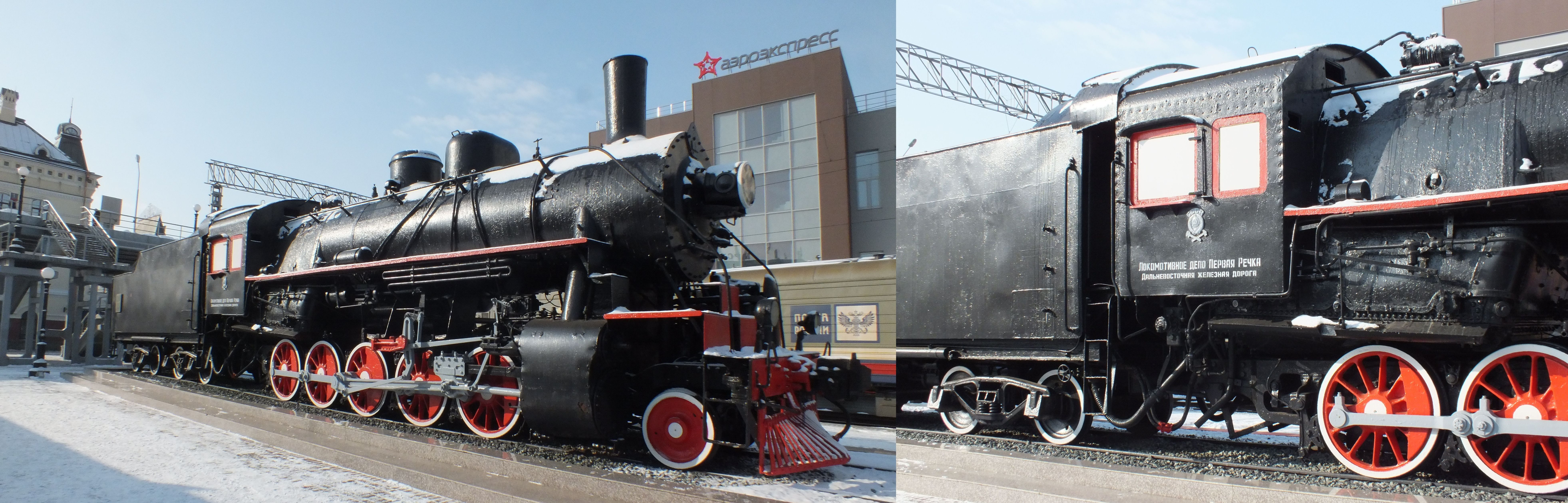 Soviet locomotive class Еа